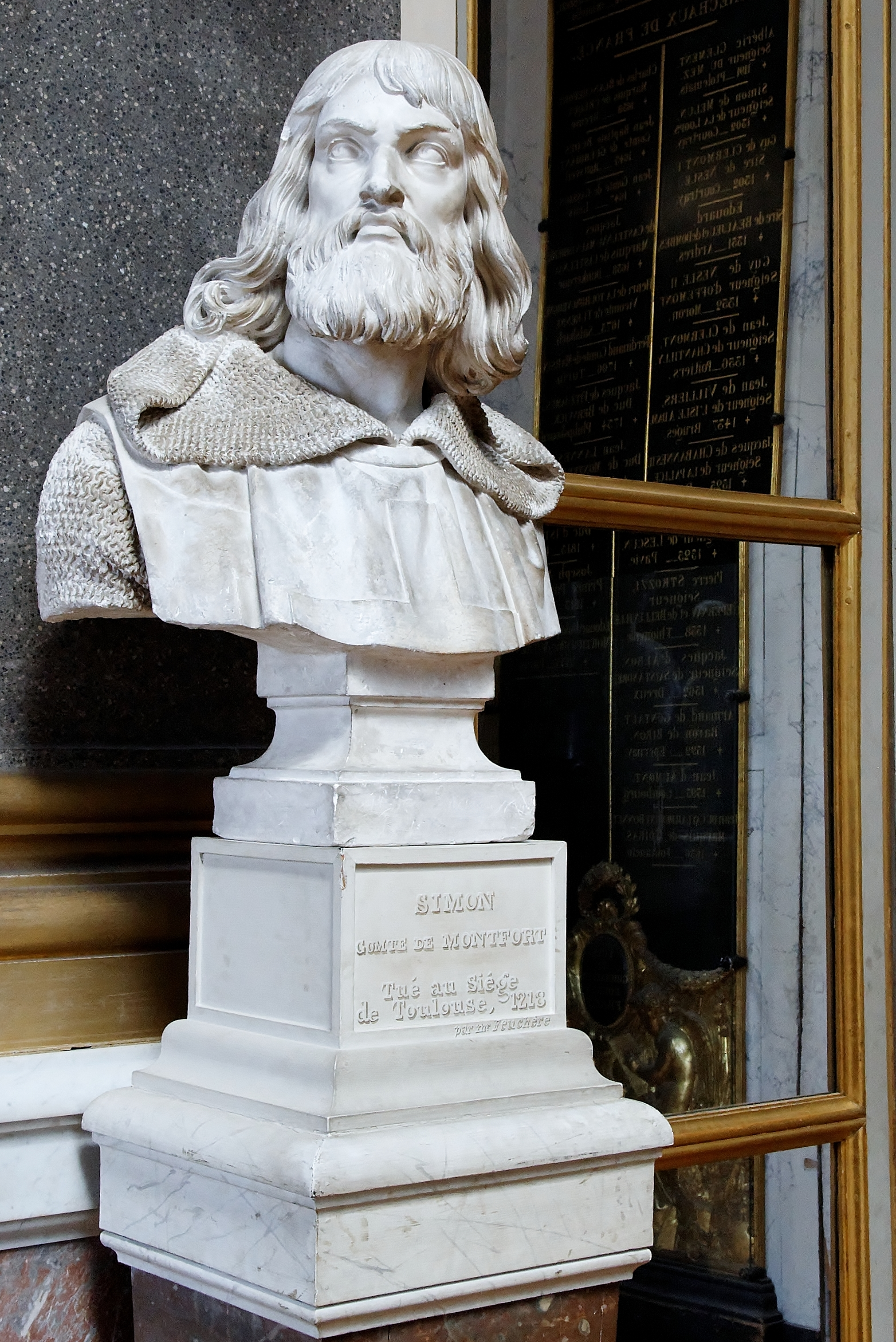 Simon de Montfort par Jean-Jacques Feuchère